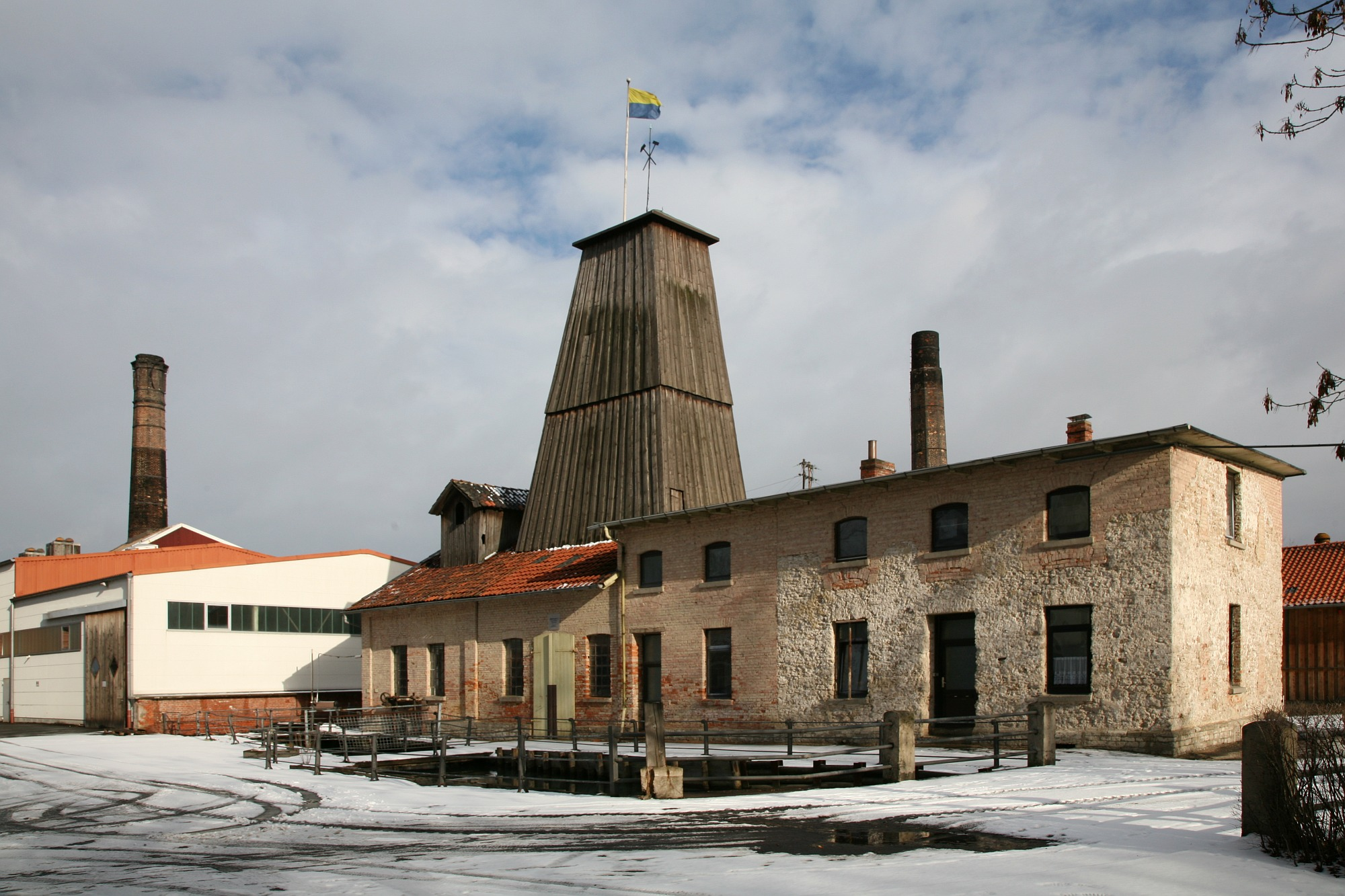 Saline Luisenhall, Göttingen, Germany